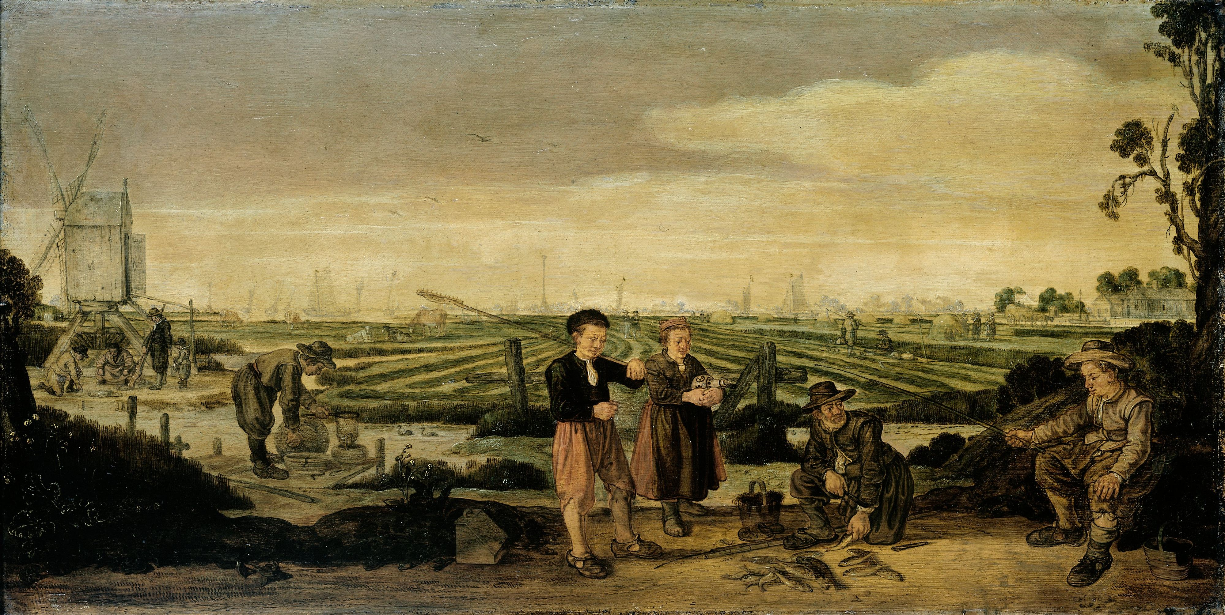 Landschap met een groepje vissers en boeren. Op de velden hierachter wordt hooi geoogst en graast vee. Links wordt bij een molen gedobbeld. Pendant van SK-A-1447.